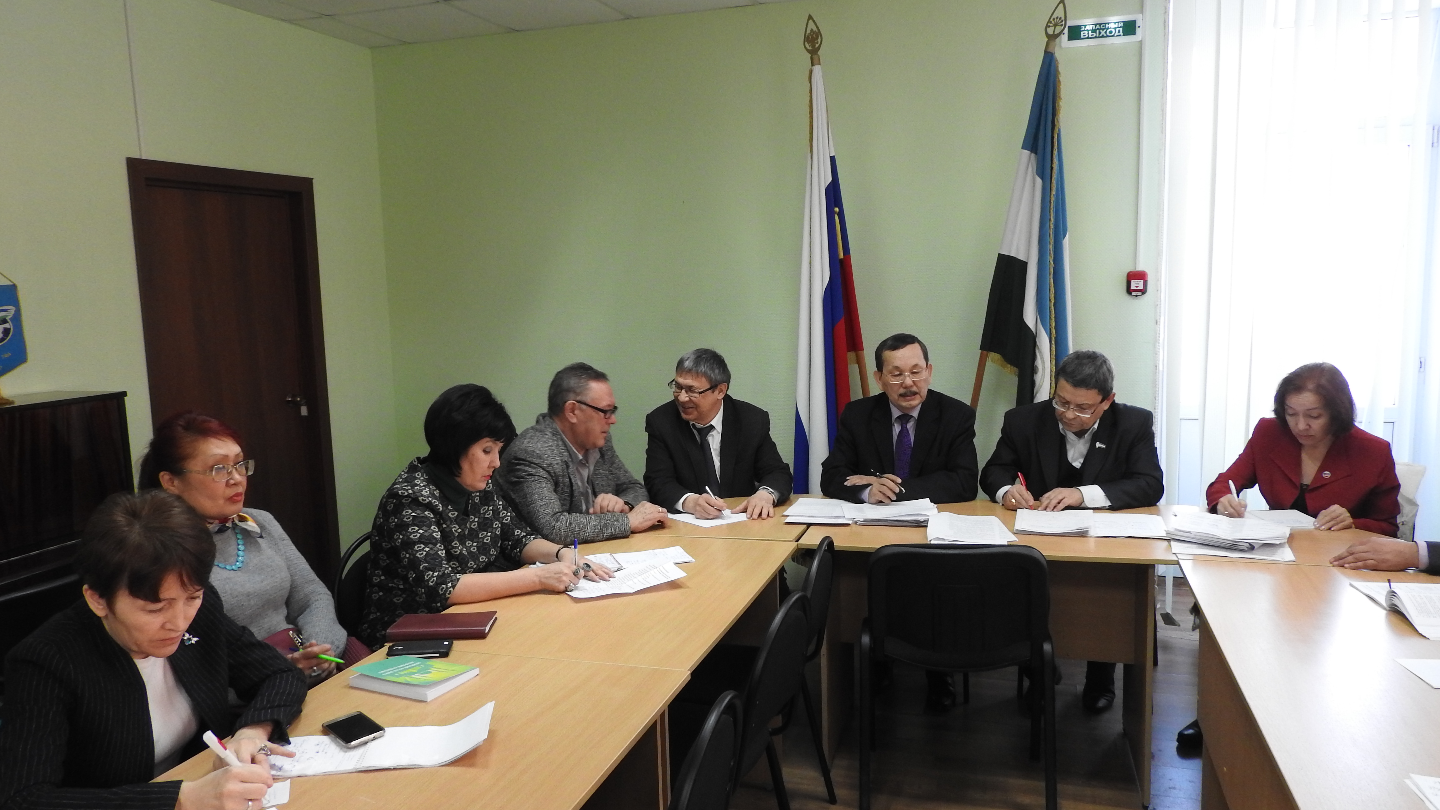 Башҡортса: Табын йәмәғәт ойошмаһын ойоштороу йыйылышы.17 февраль 2017